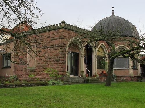 Atelier des Bildhauers Valentin Weidner (2013), erbaut 1903 vom Architekten Carl Krampf